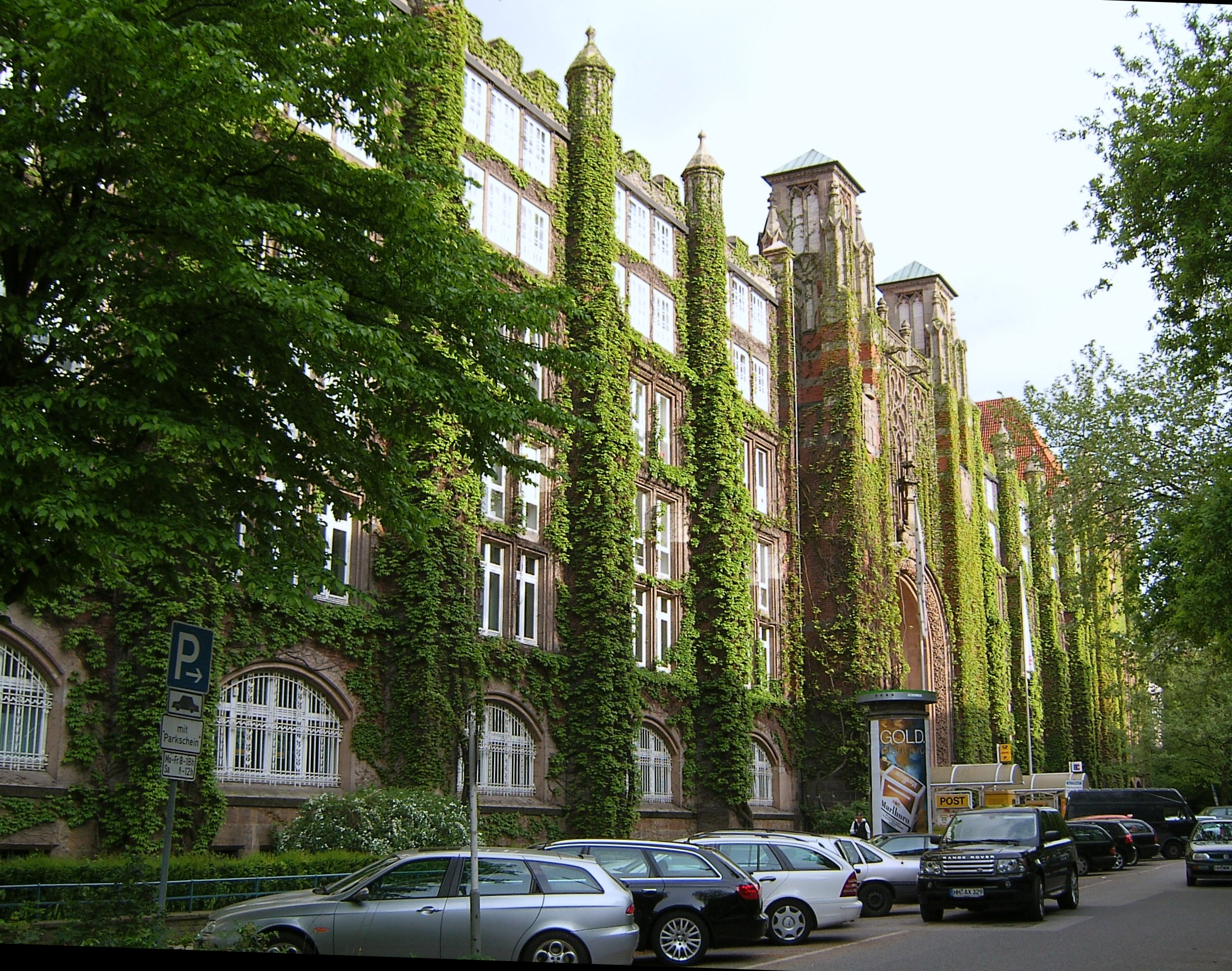 Das ehemalige Fernmeldeamt 1 in der Schlüterstraße 51-55 in Rotherbaum beherbergte auch das Postamt HH13. Das Gebäude wurde von 1907 bis 1907 durch den Geheimen Baurat Paul Schuppan und Postbaurat Willy Sucksdorf errichtet. In neogotischer Art gliedert Sandstein die Backsteinfassade. This is a photograph of an architectural monument.